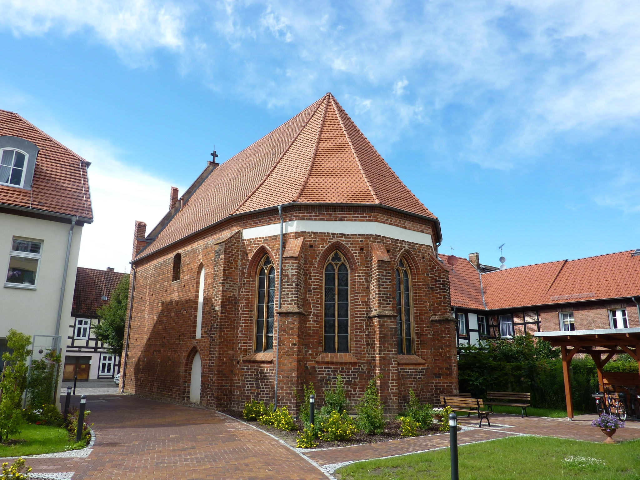 St Georgenkapelle (Templin)